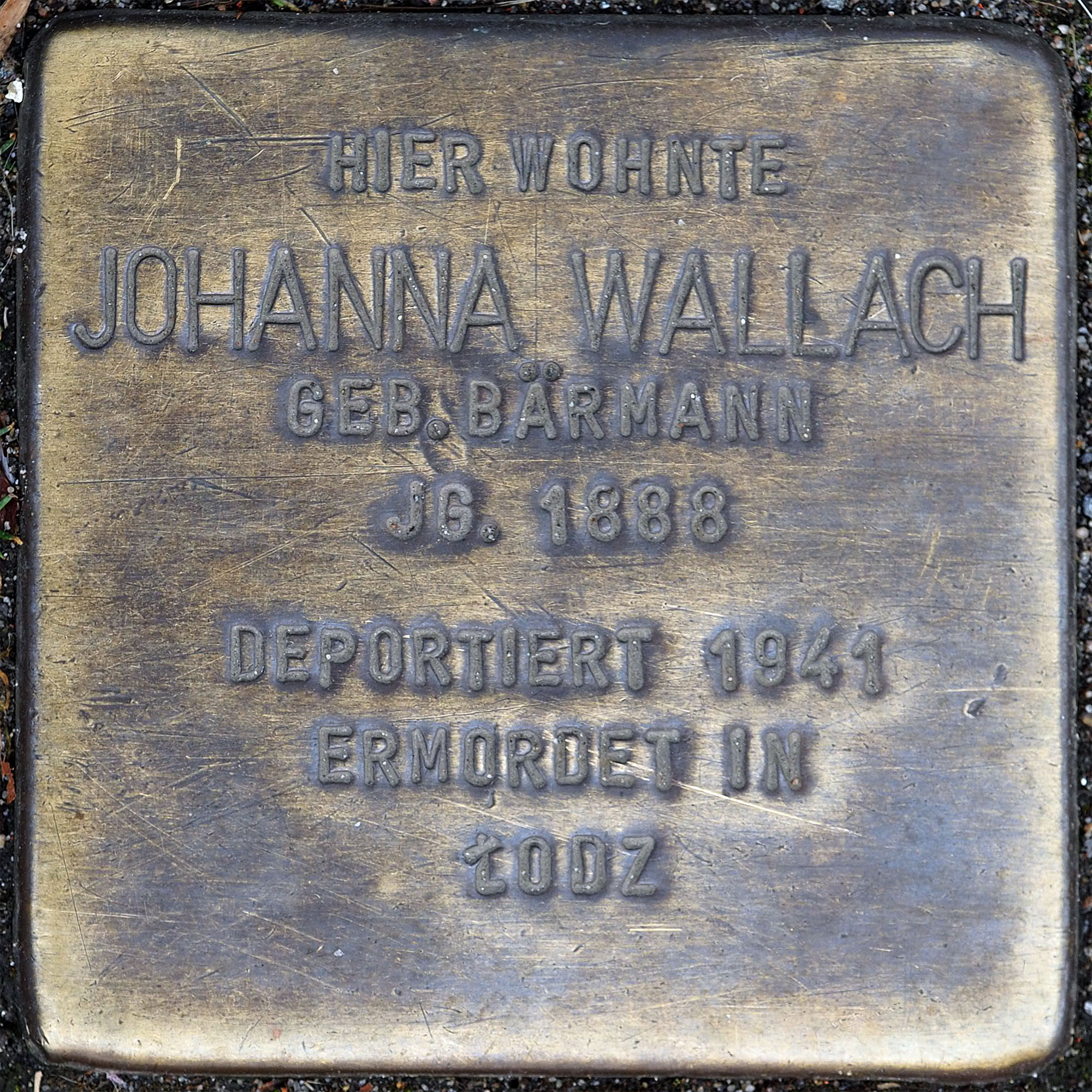 Stolpersteine MG: Wallach, Johanna